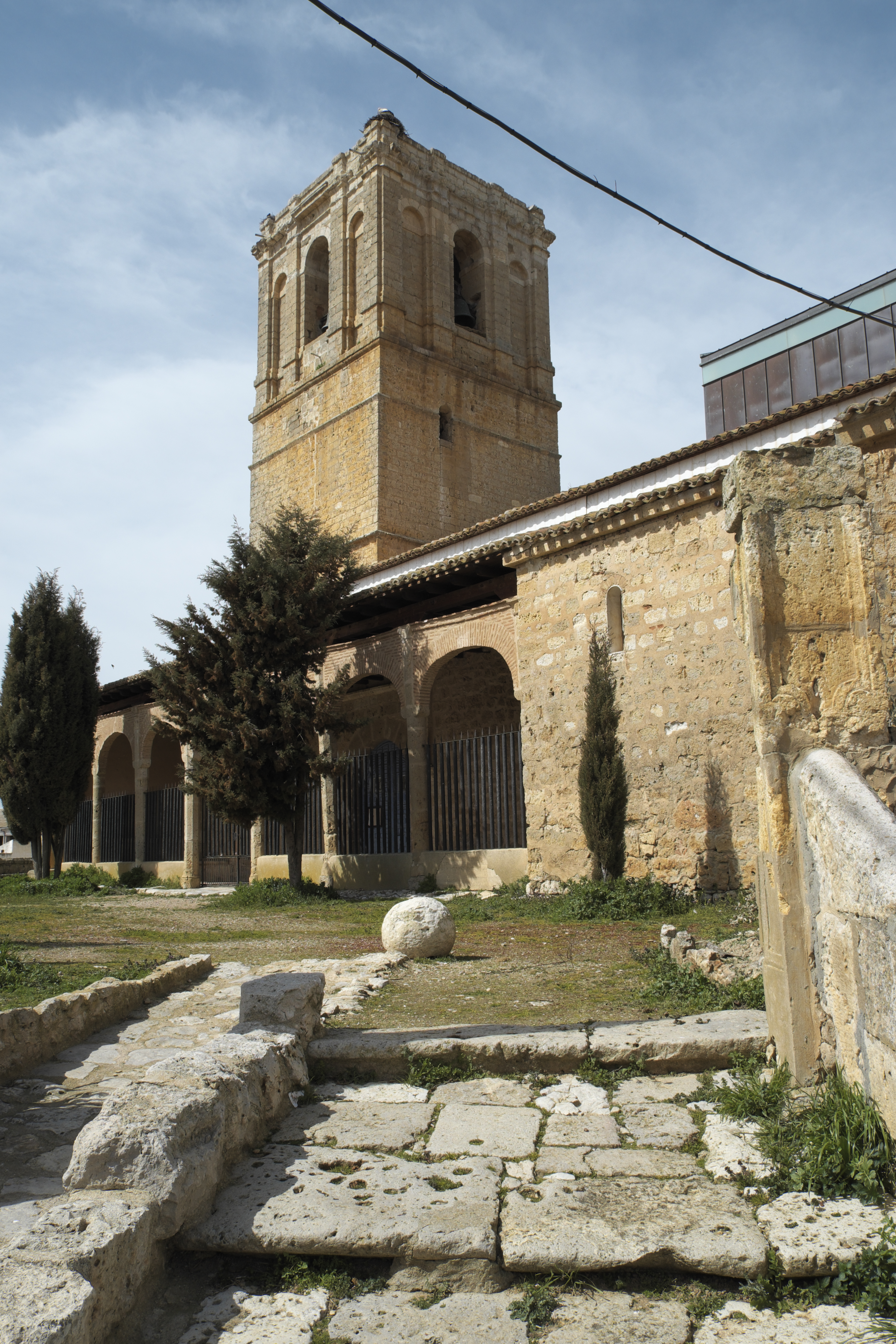 Kirche San Ginés in Villabrágima in der Provinz Valladolid (Kastilien-León/Spanien), aus dem 16.Jh.